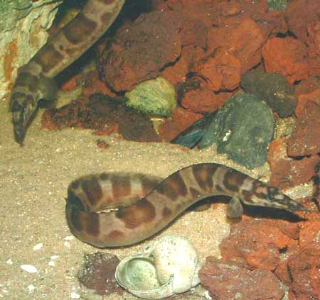 Aethiomastacembelus ellipsifer Prédateur nocturne (paedophage).